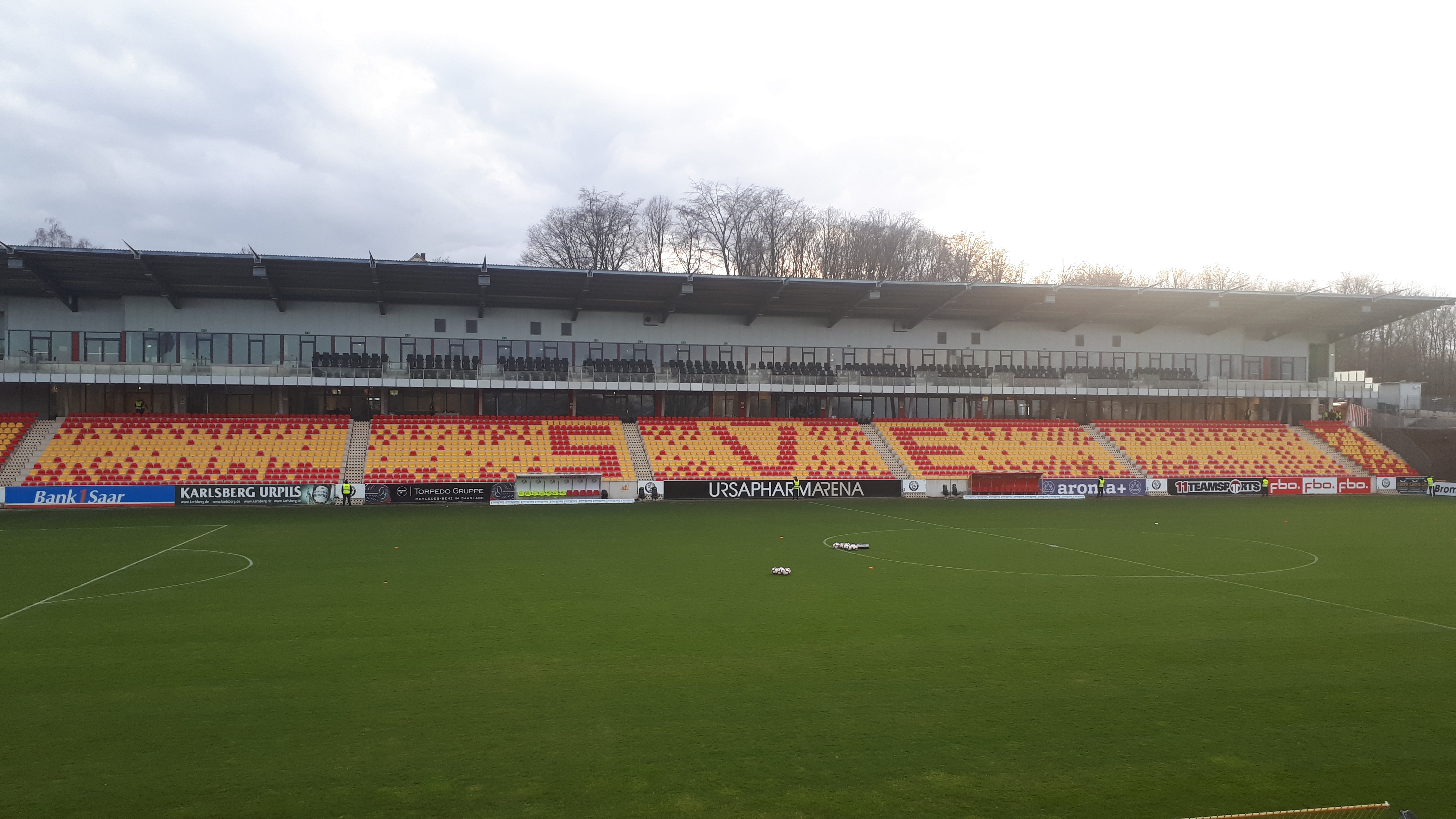 neue Haupttribüne, Stadion Kaiserlinde, Elversberg, 8. März 2019